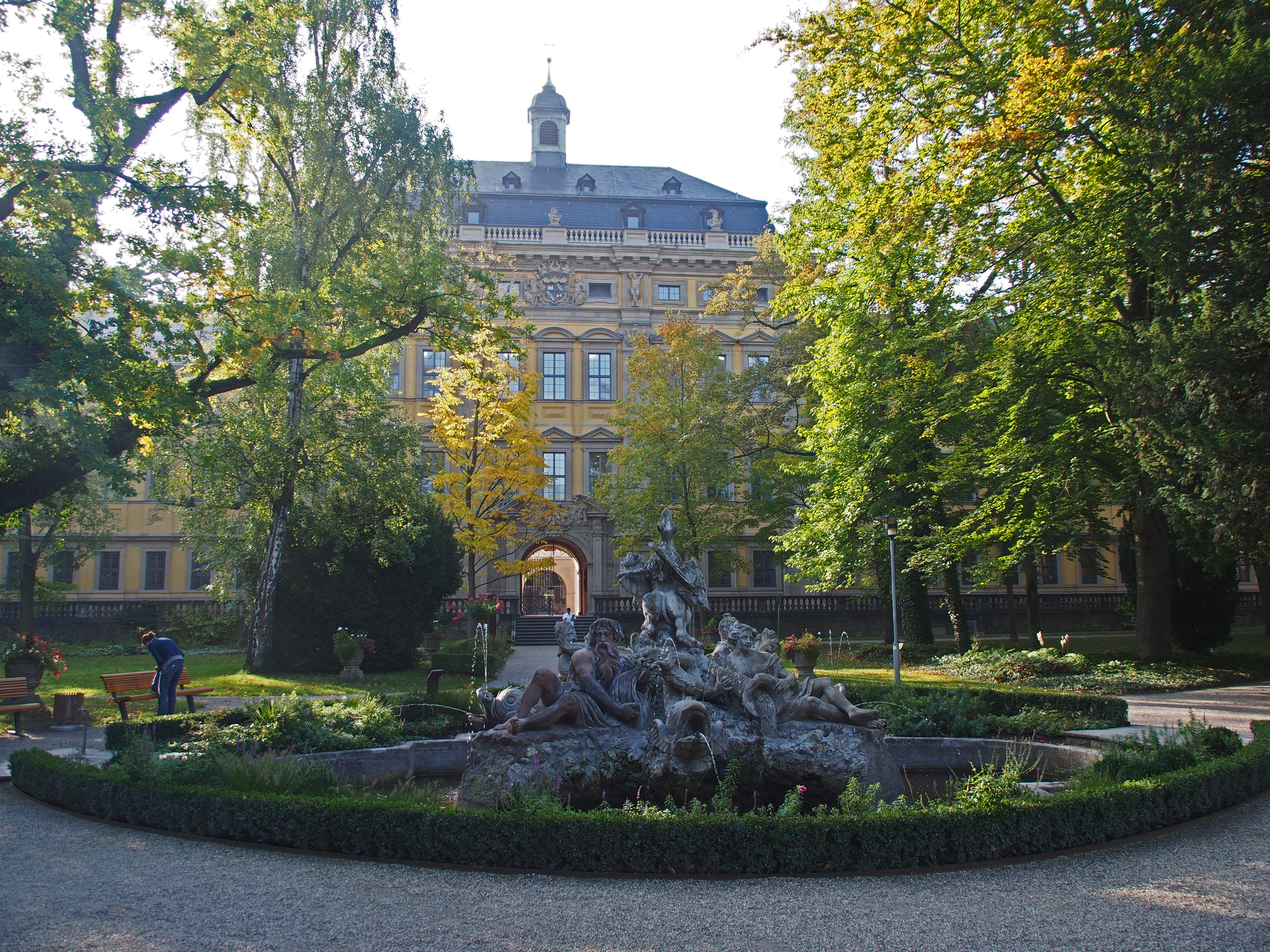 Vierströmebrunnen (auch Greifenbrunnen oder Auverabrunnen) in der Parkanlage des Juliusspitals. 1706-08 erbaut von Jakob van der Auvera (1672-1760).